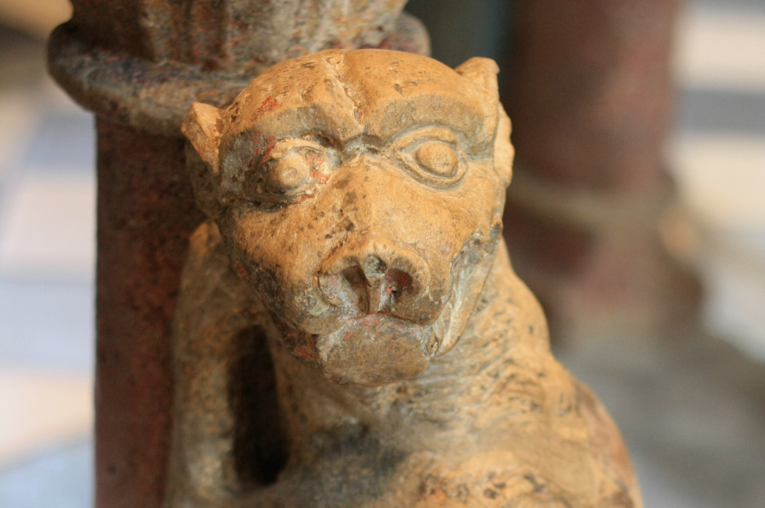 Grabmal des Konrad Kurzbold im Dom zu Limburg, Figur eines Bären